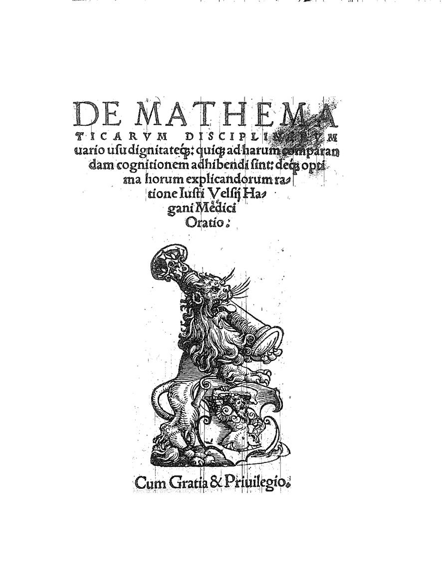 Frontespizio